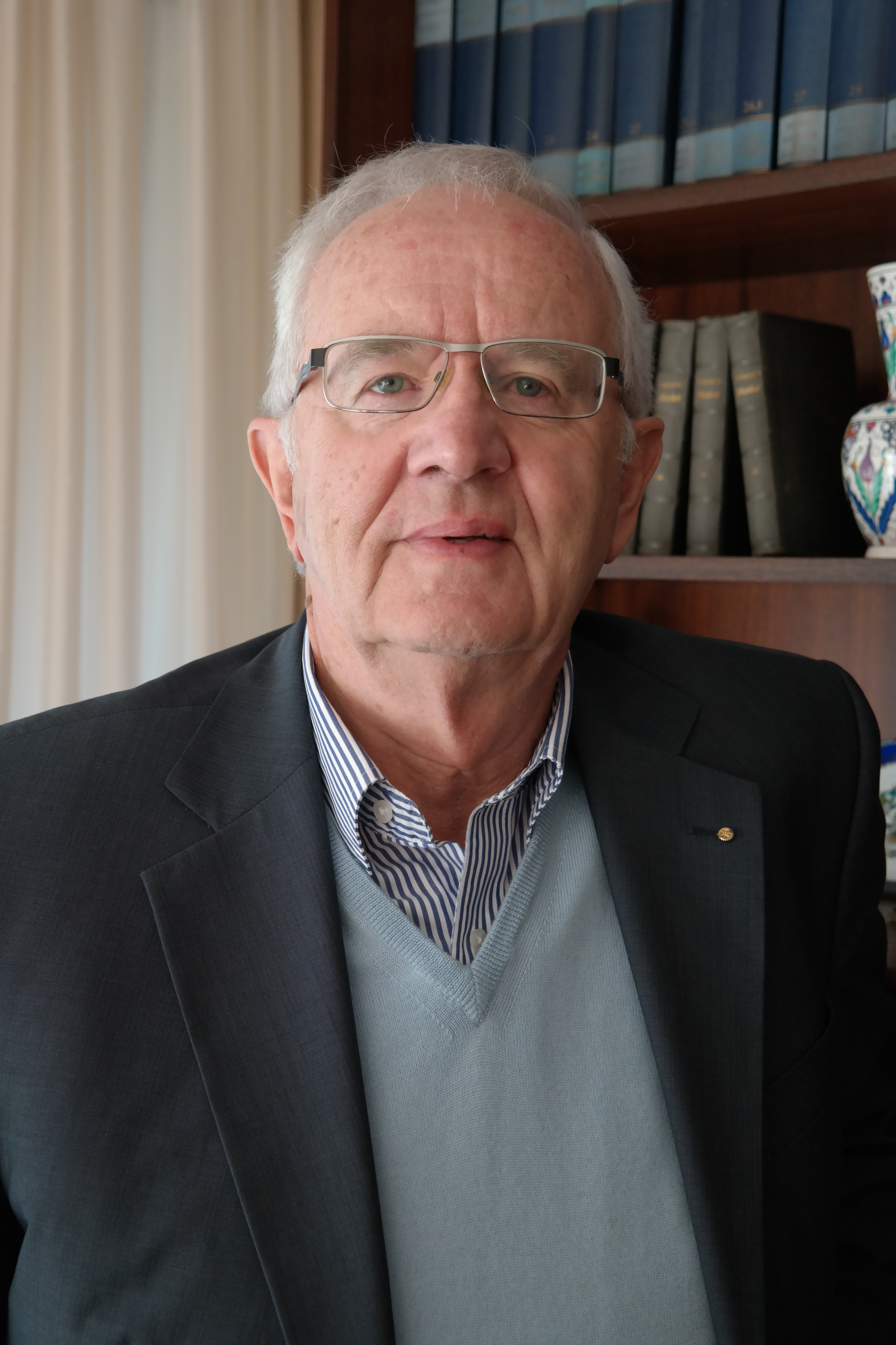 Portrait von Hermann Strasser